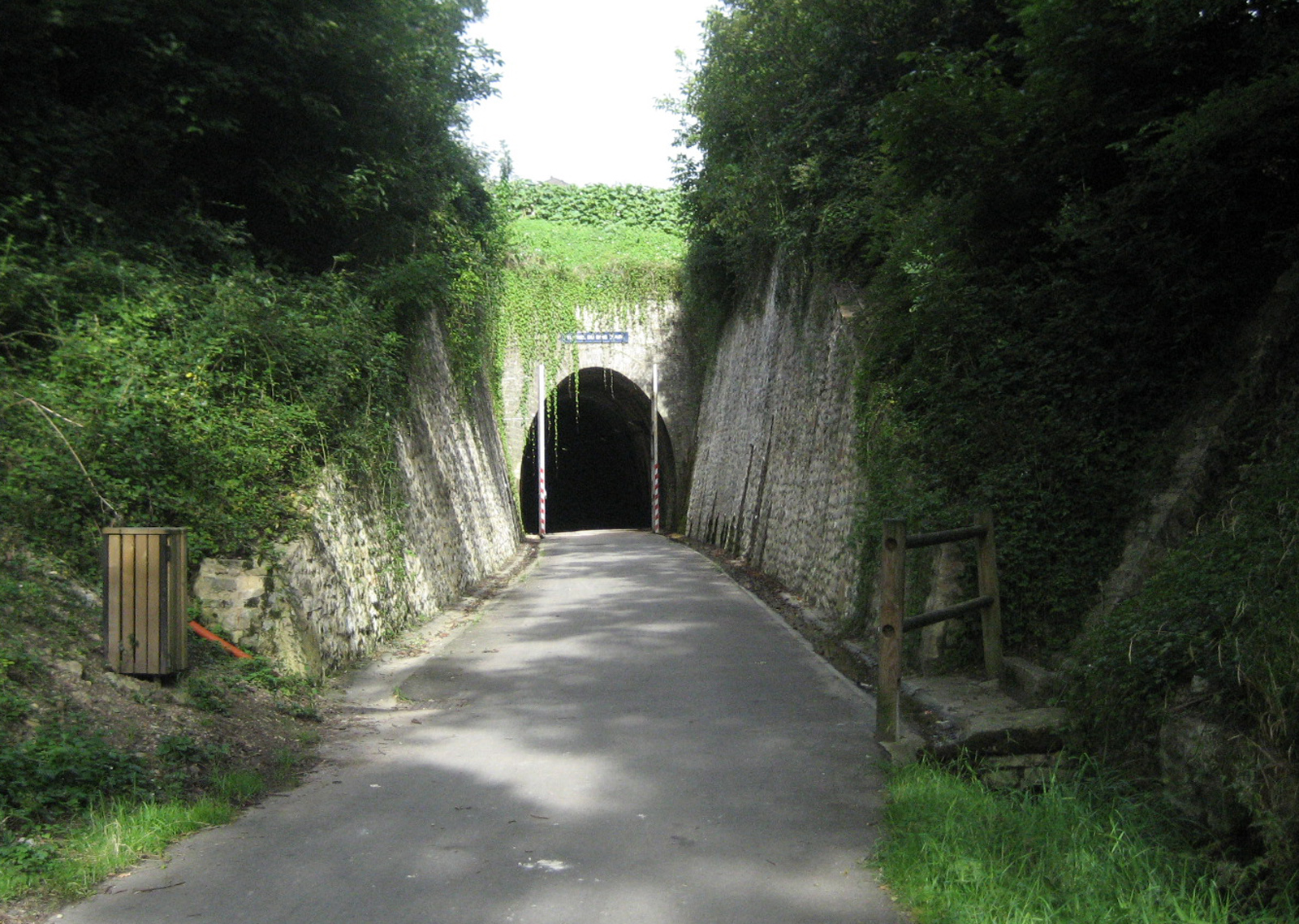 Tunnel du Bois Clair (Saône-et-Loire, France) South entrance